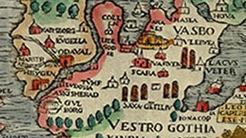 Map of Västergötland in Sweden